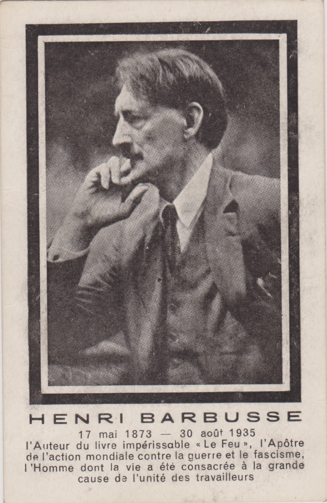 Carte postale éditée lors de la mort d'Henri Barbusse, en 1935, par le Comité mondial contre le fascisme et la guerre (le nom de ce comité est la seule mention figurant au verso). Aucun crédit photographique apparent.